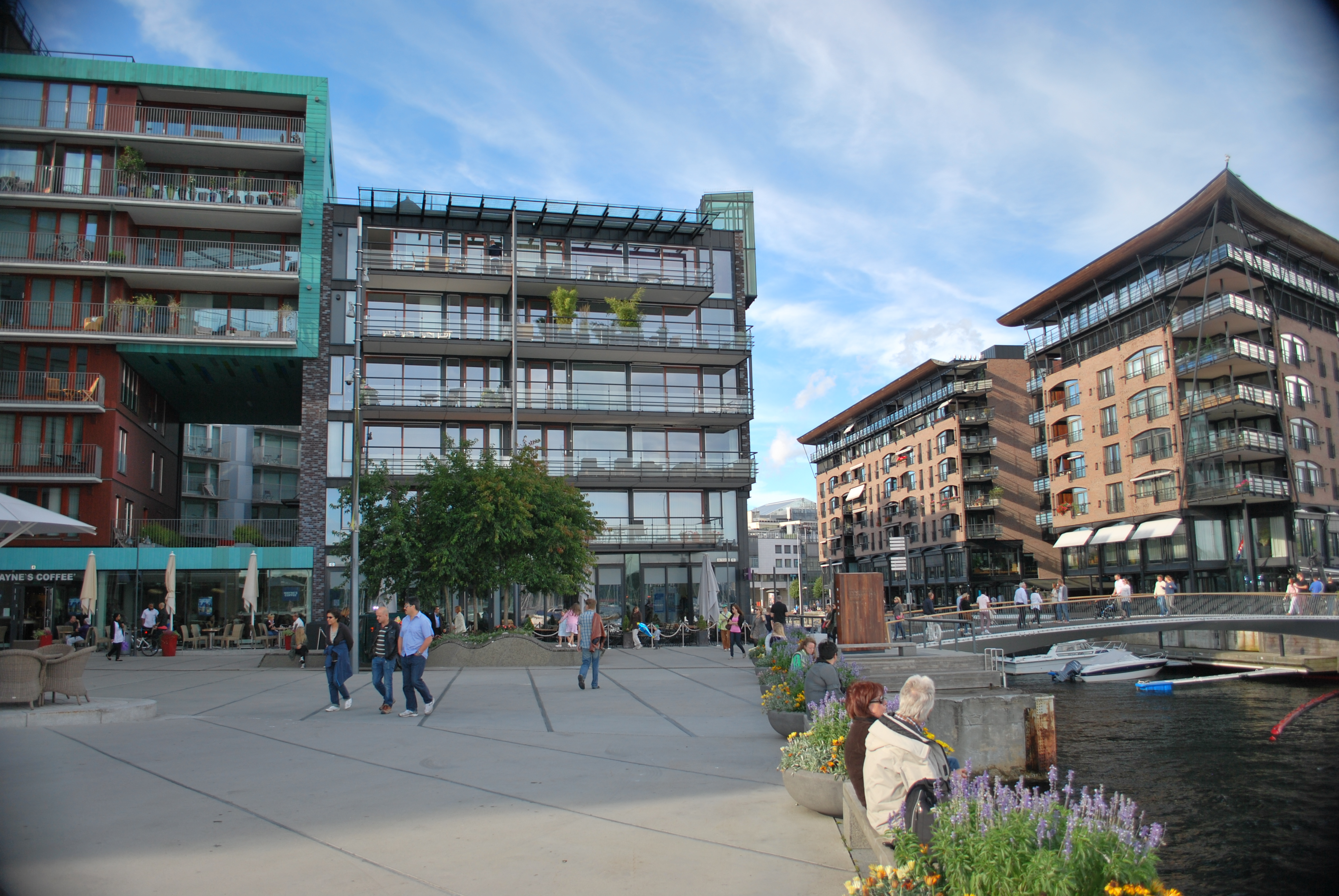 Plassen ved Lille Stranden, Odden, Tjuvholmen, Oslo. Aker brygge til høyre